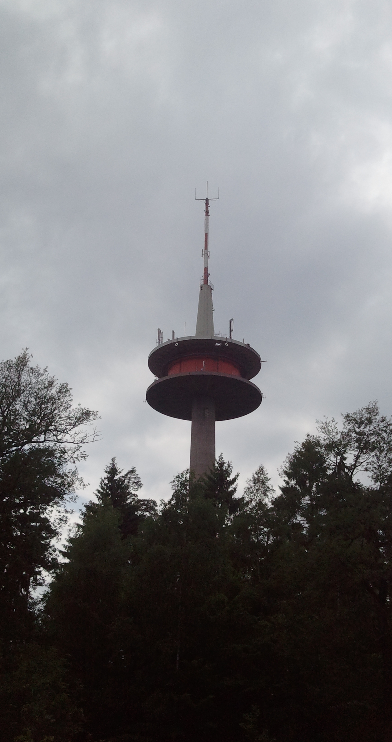 Aufnahme aus Richtung Ost von BAB A7